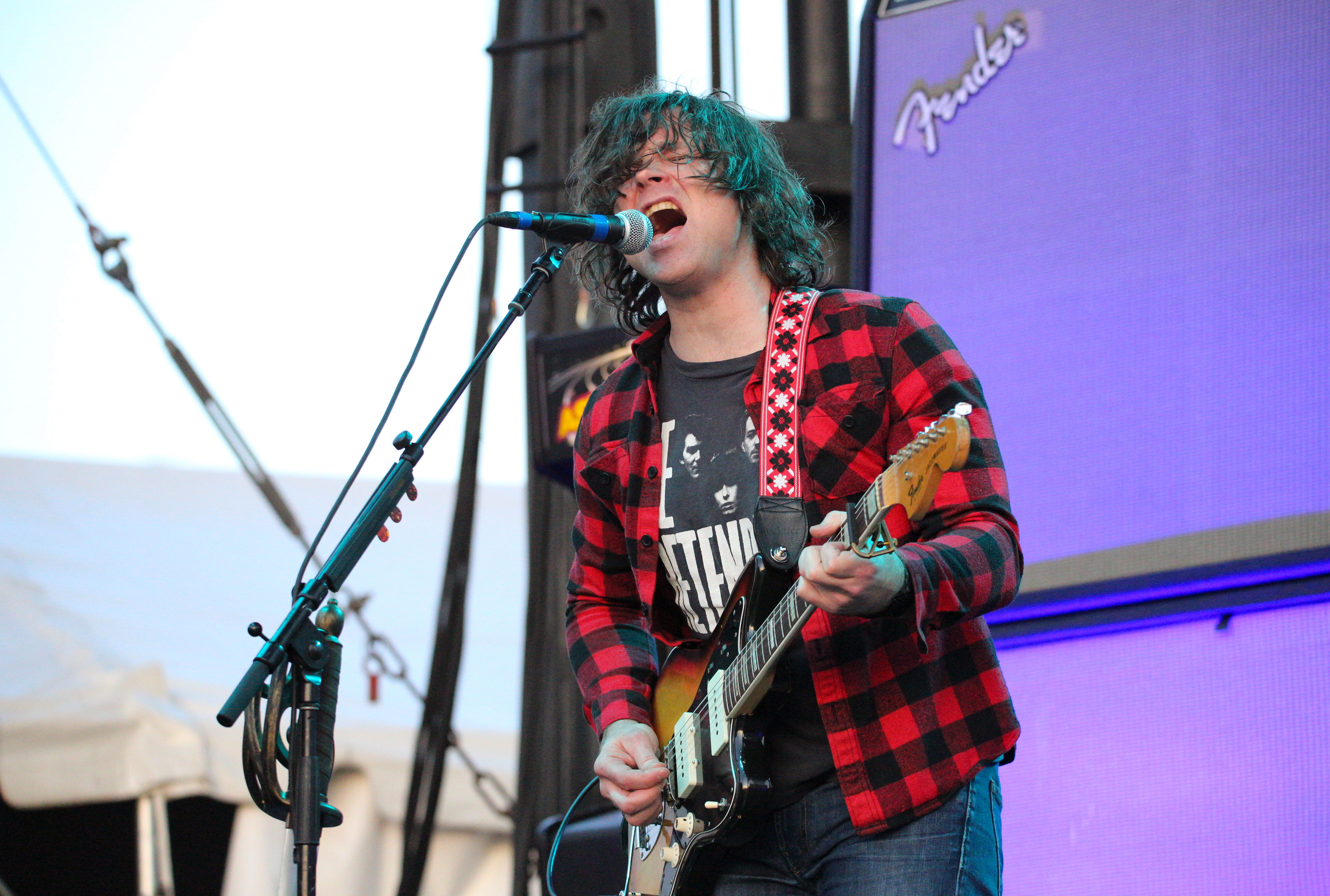 Ryan Adams